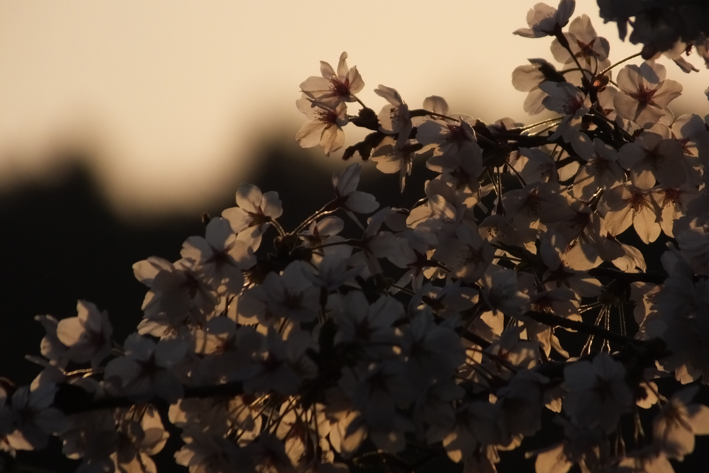 2020-04-07 Prunus × yedoensis Tambasasayama,Hyogo(丹波篠山市のソメイヨシノ)